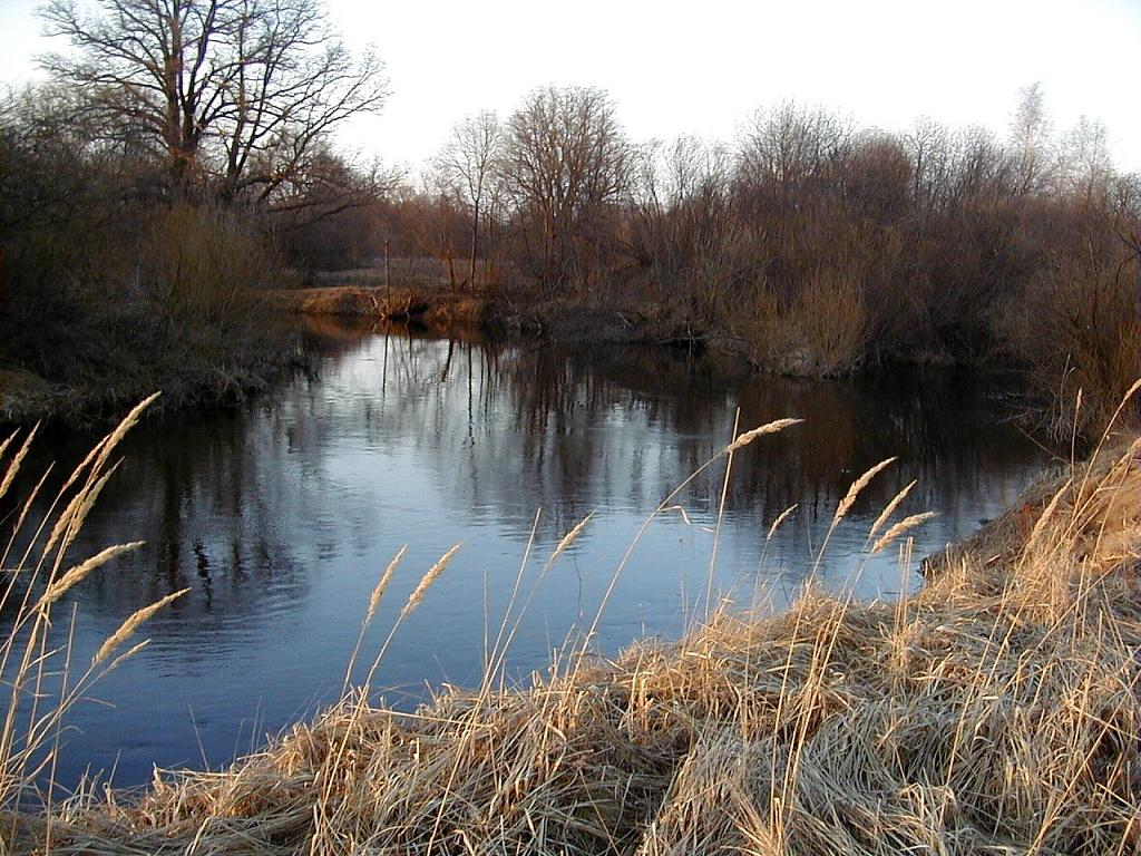 Sitas ieteka Pededzē. 2002-03-29